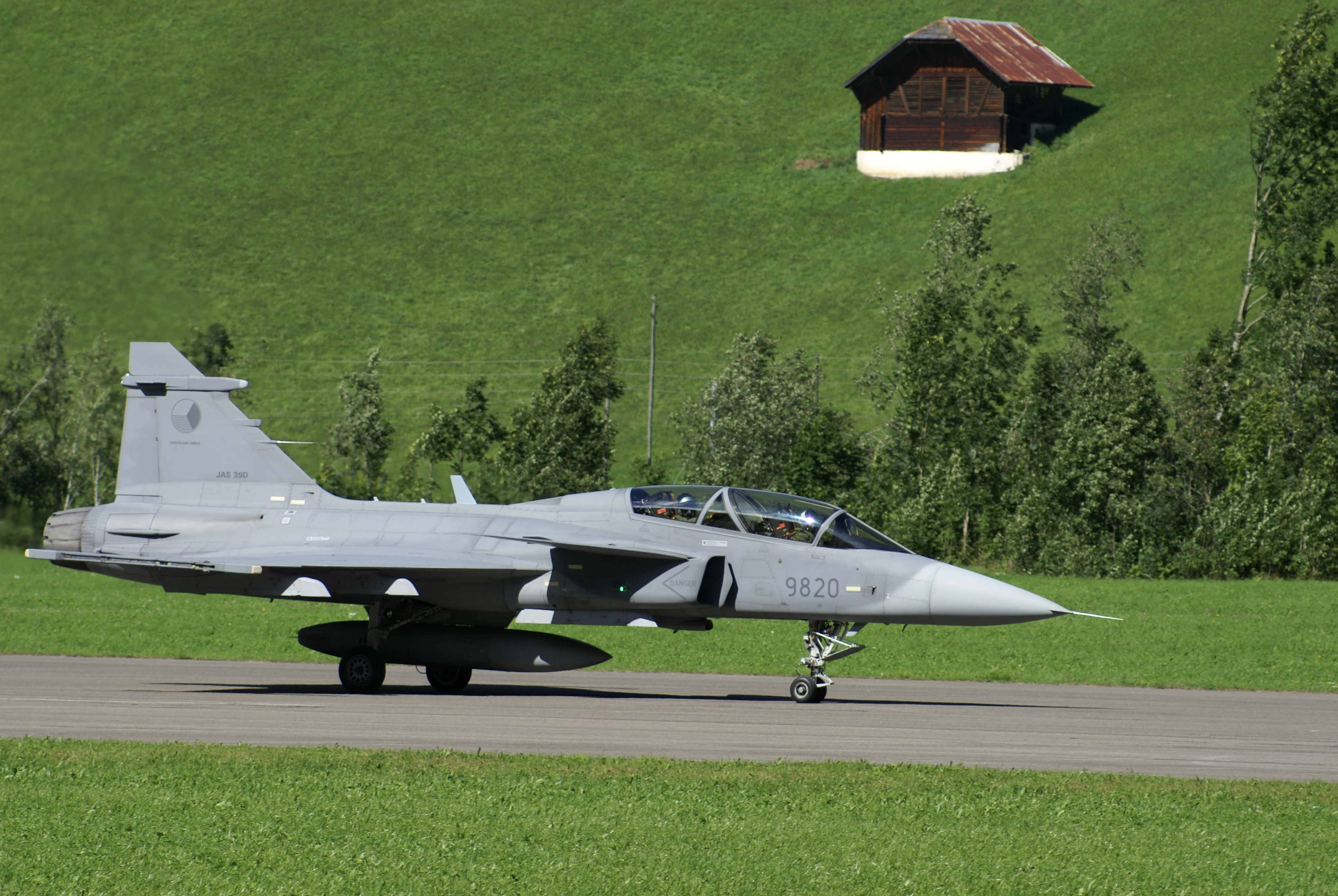 JAS 39 Gripen in land